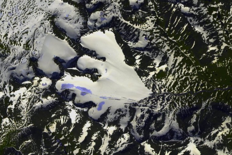 Photo satellite ASTER (NASA) du massif du Pårte , dans le parc national de Sarek, en Botnie du Nord (Norbotten), Suède. Glaciers caractéristiques du massif. Photo prise le 2 septembre 2008.